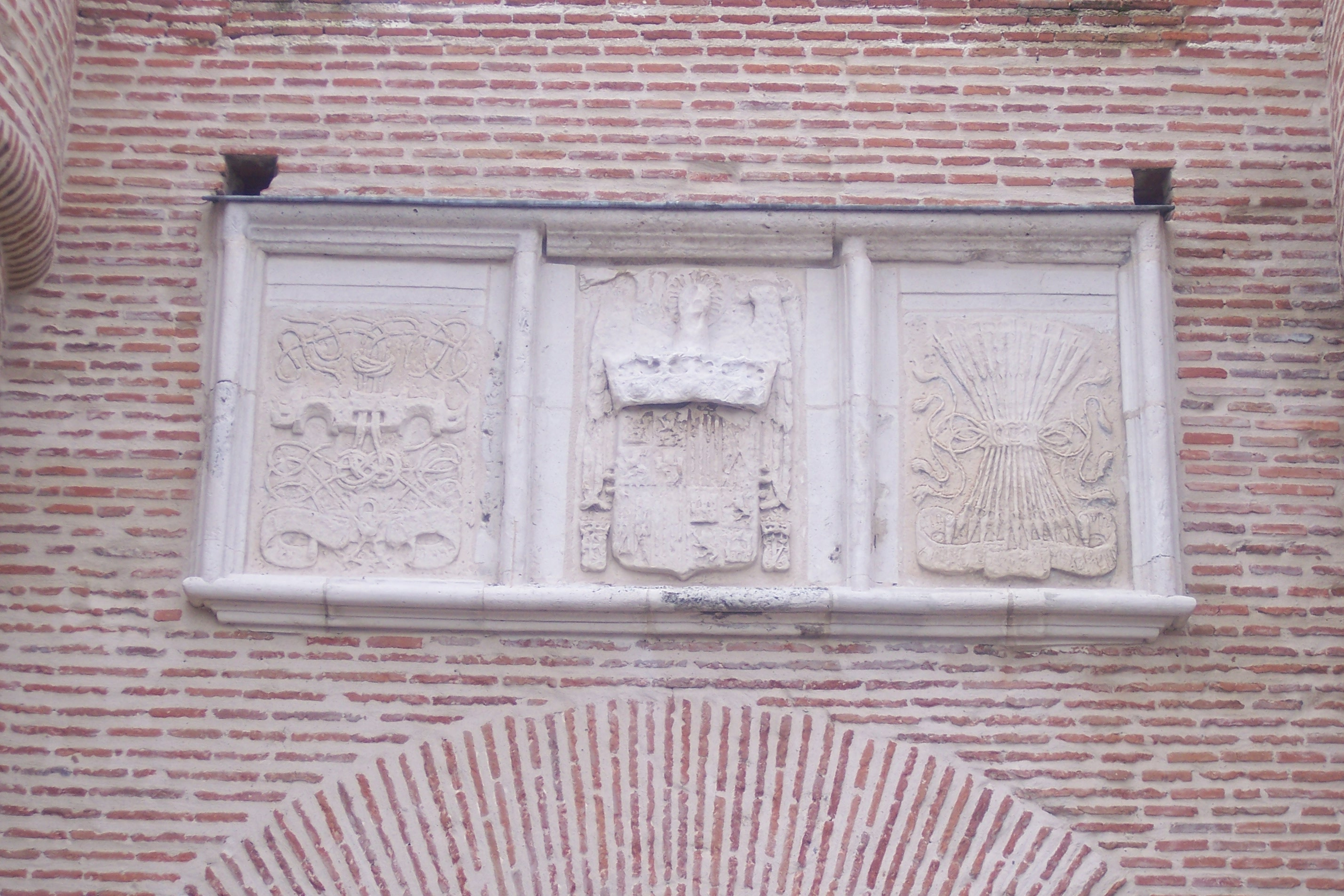 Escudos situados en la puerta de entrada del castillo de La Mota en Medina del Campo, Valladolid (España).